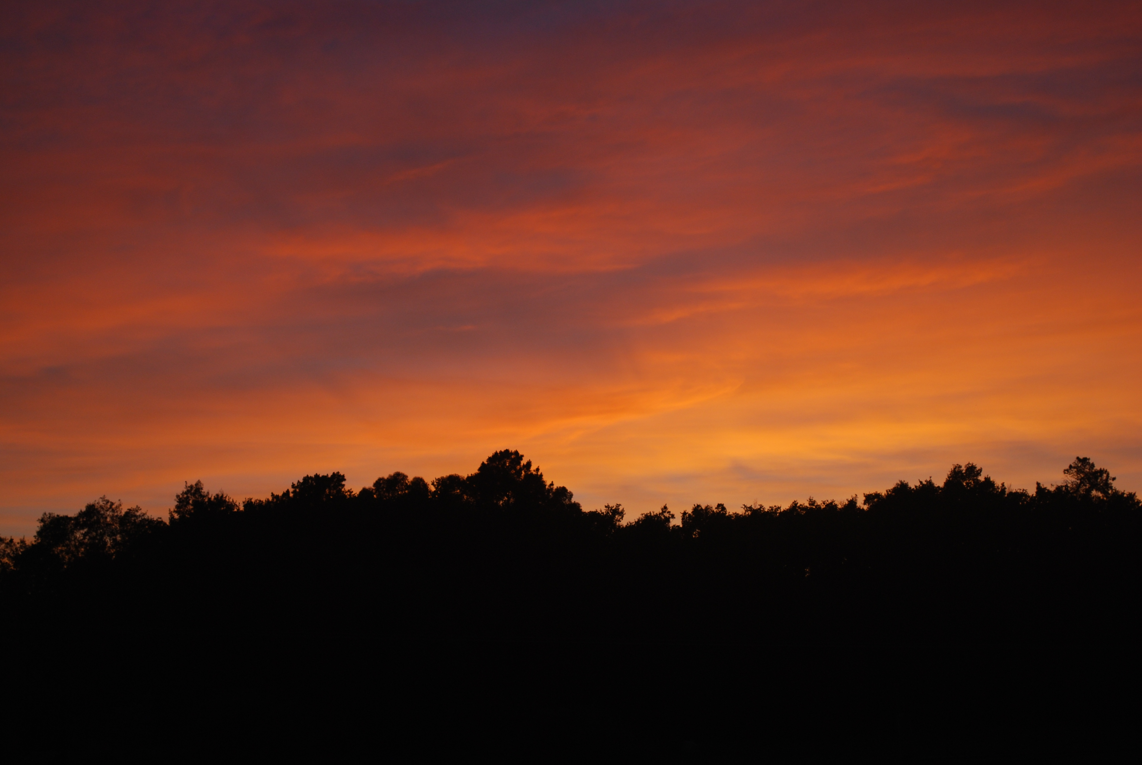 Solpor en Covas, Forcarei